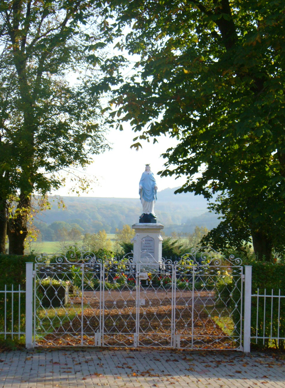 Vue de la statue de Notre-Dame d'Altviller (Moselle)